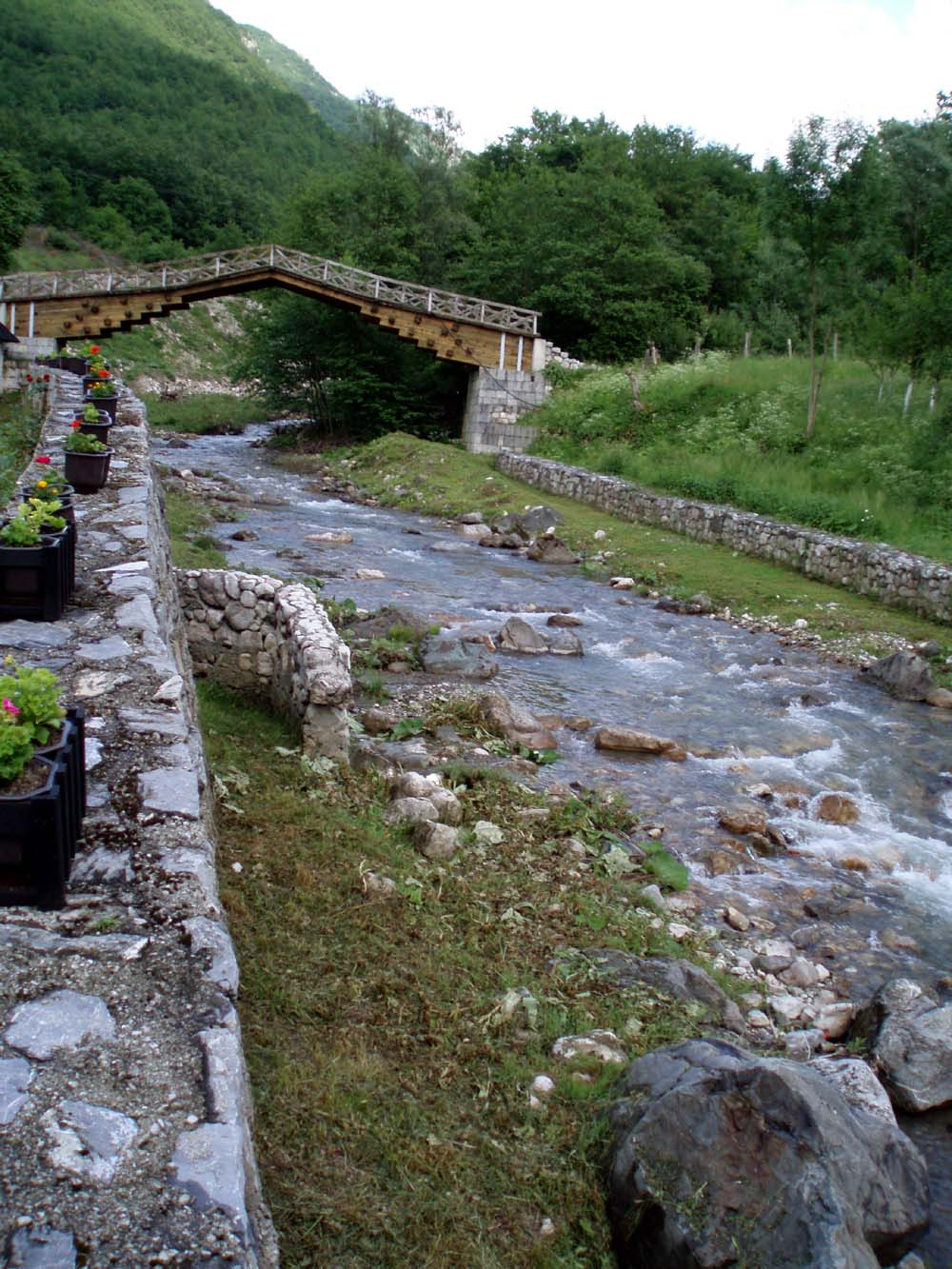 Mileseva